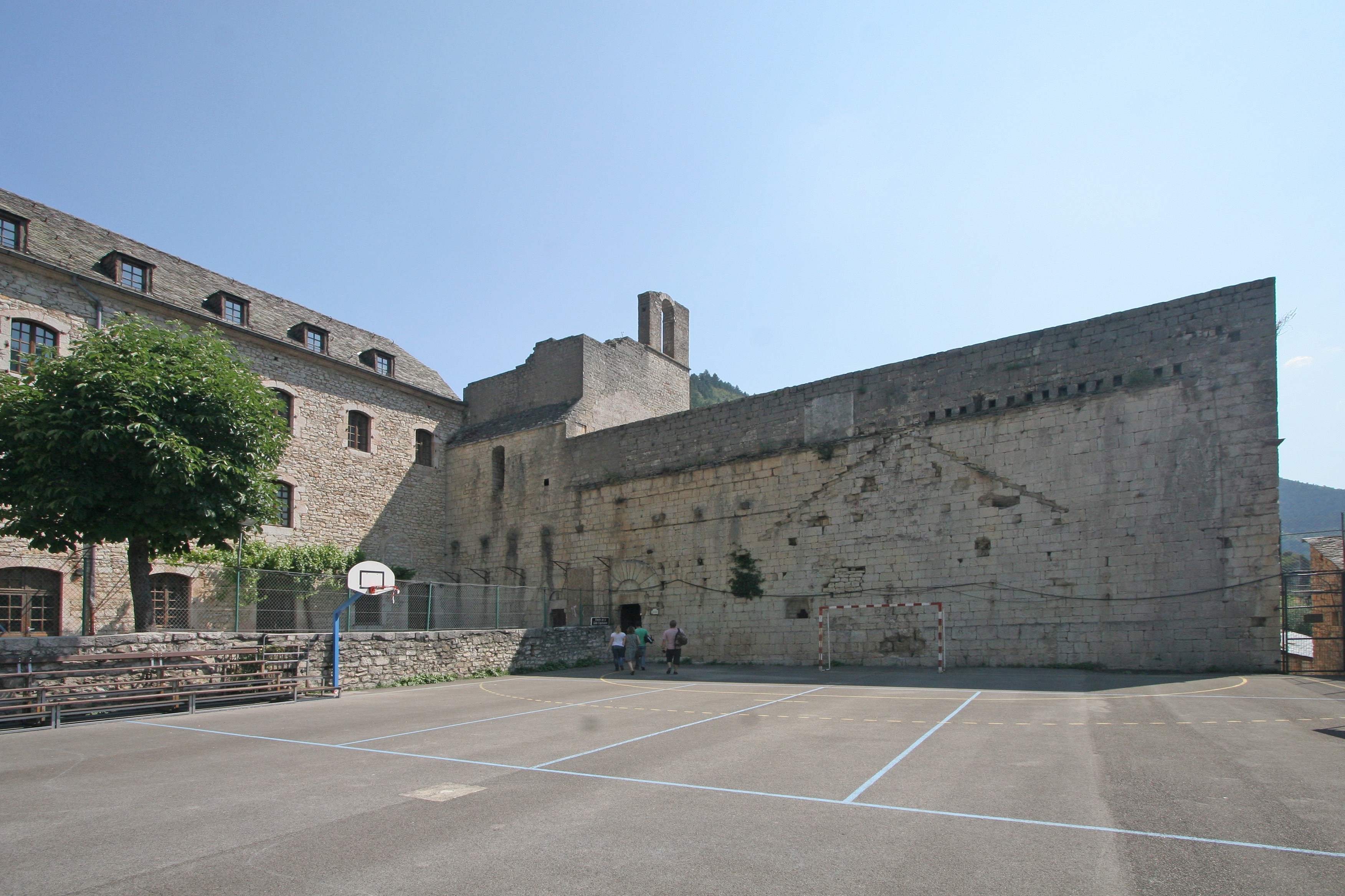 Monastère de Sainte-Enimie .